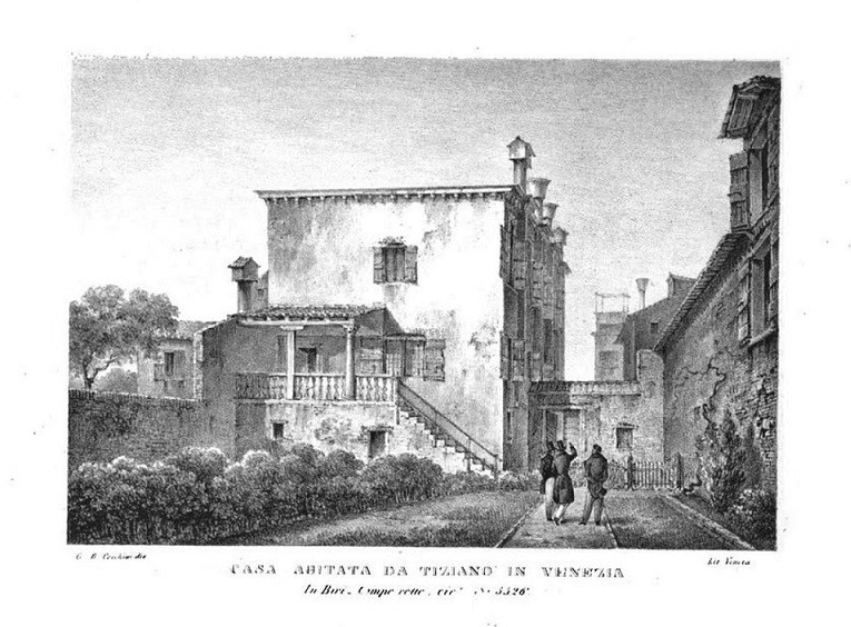 Casa di Tiziano a Venezia